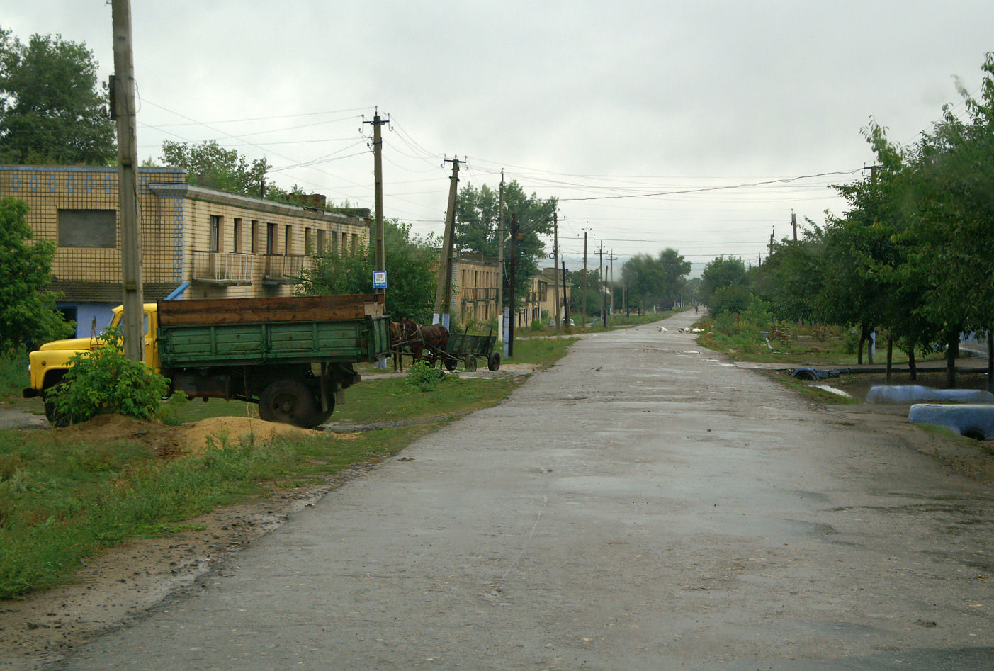 Bergstrasse in Wessela Dolyna (Tarutyne)